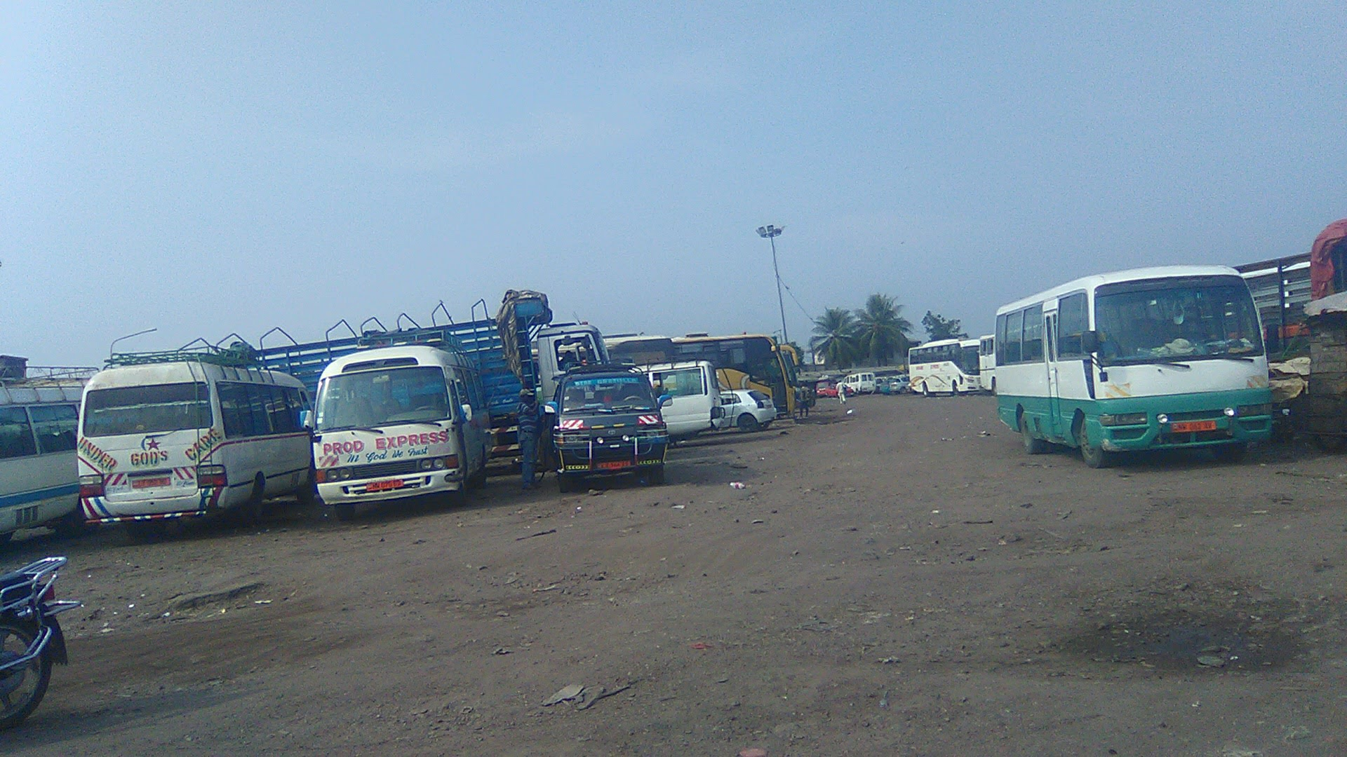 Dans la gare routière de Dschang This is an image with the theme "Africa on the Move or Transport" from: Cameroon